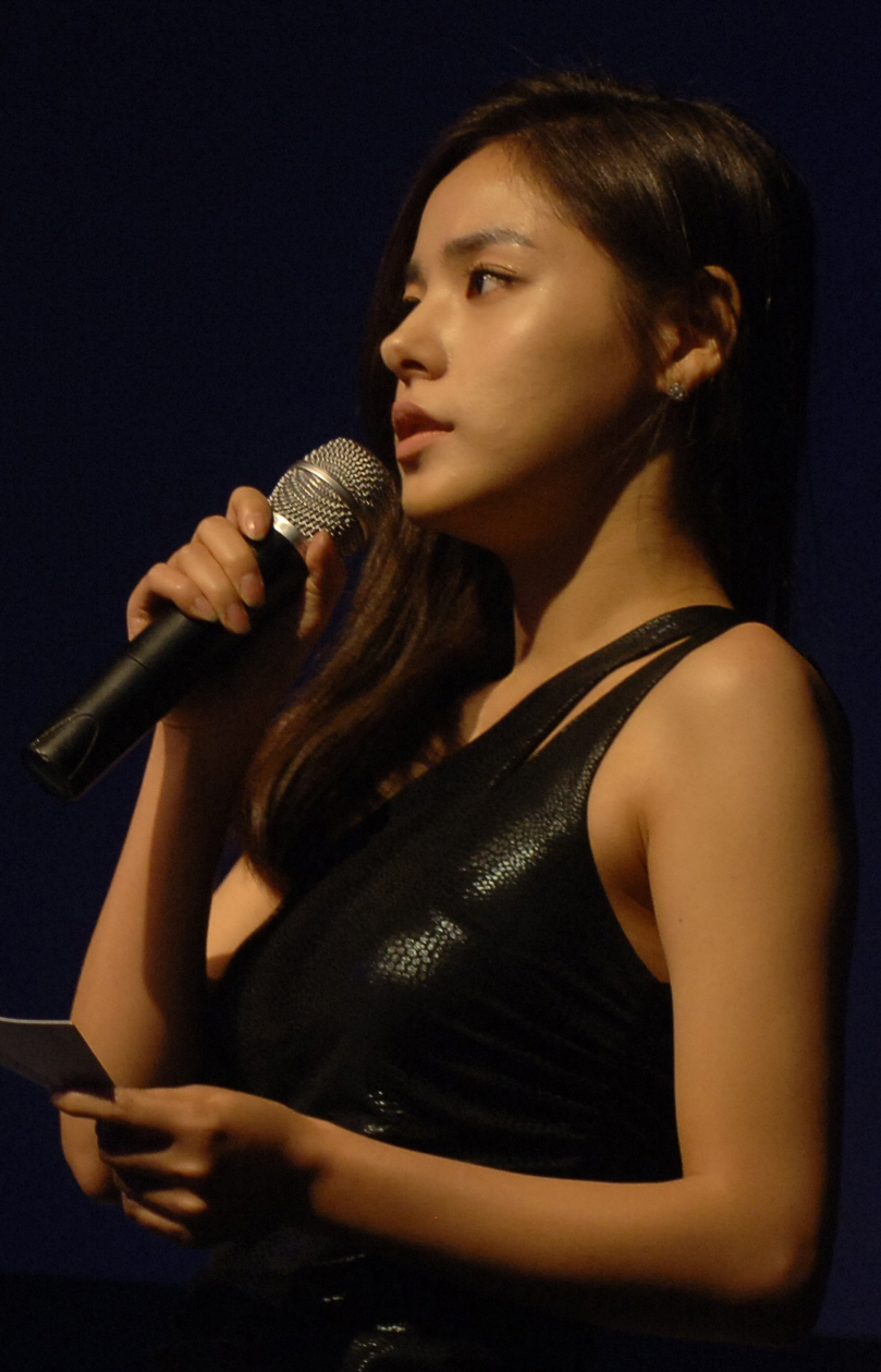 Min Hyo-Rin at the LG Optimus LTE Showcase evant